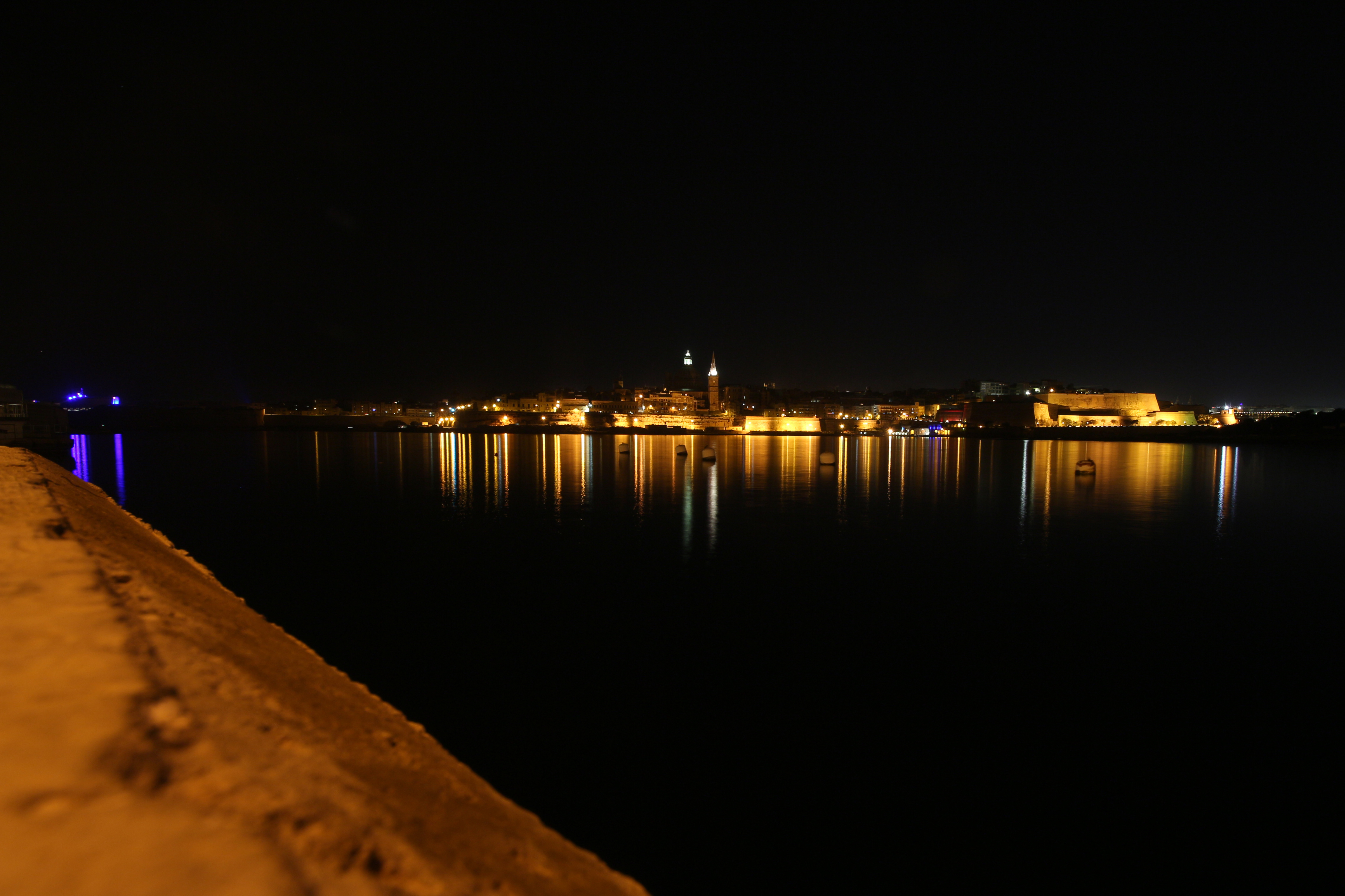 Valletta på natten sett från Sliema.